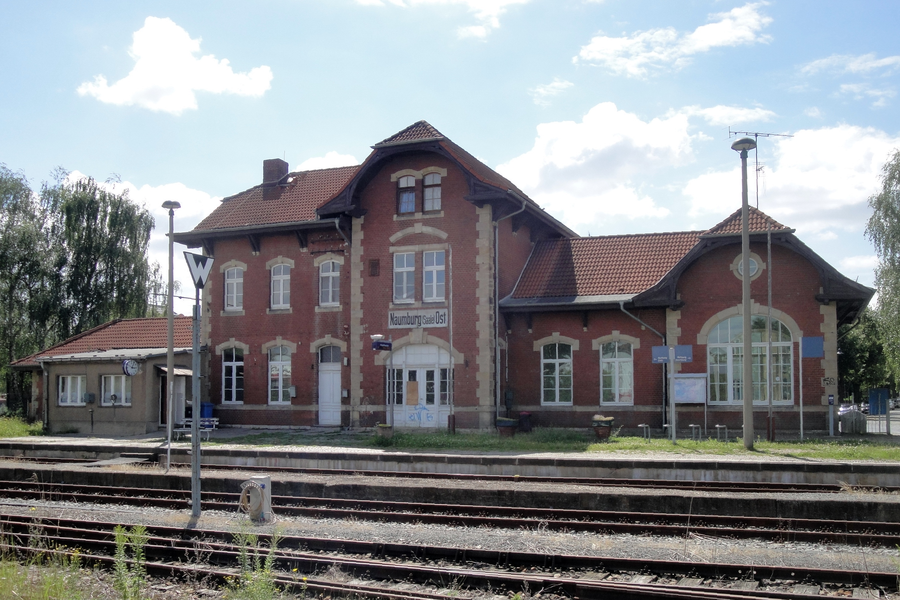 Bahnhof Naumburg (Saale) Ost, Naumburg (Saale)